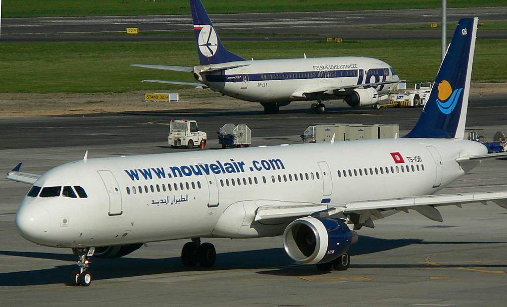 reg.: TS-IQB